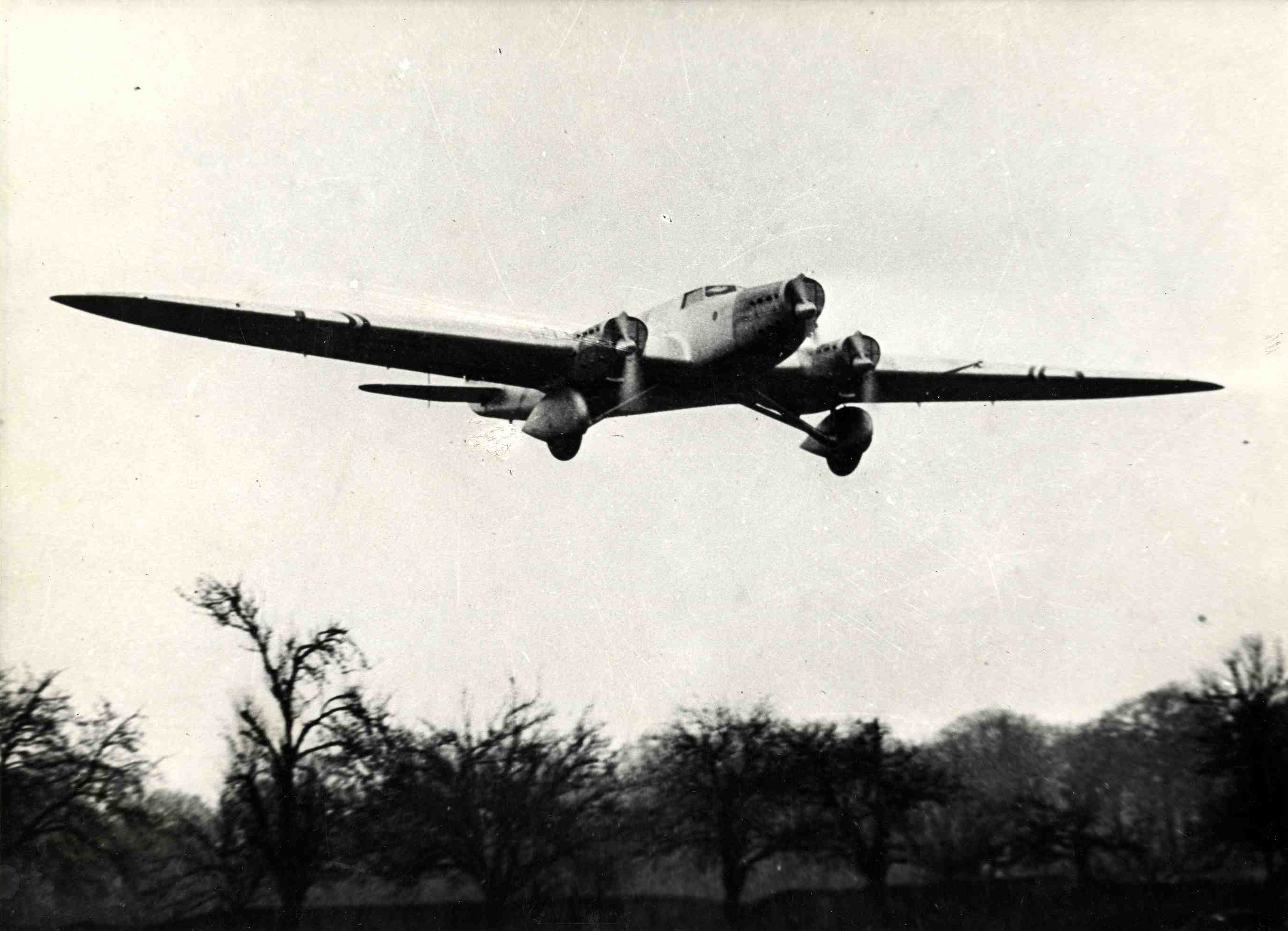 Avion Couzinet 70 a l'atterrissage